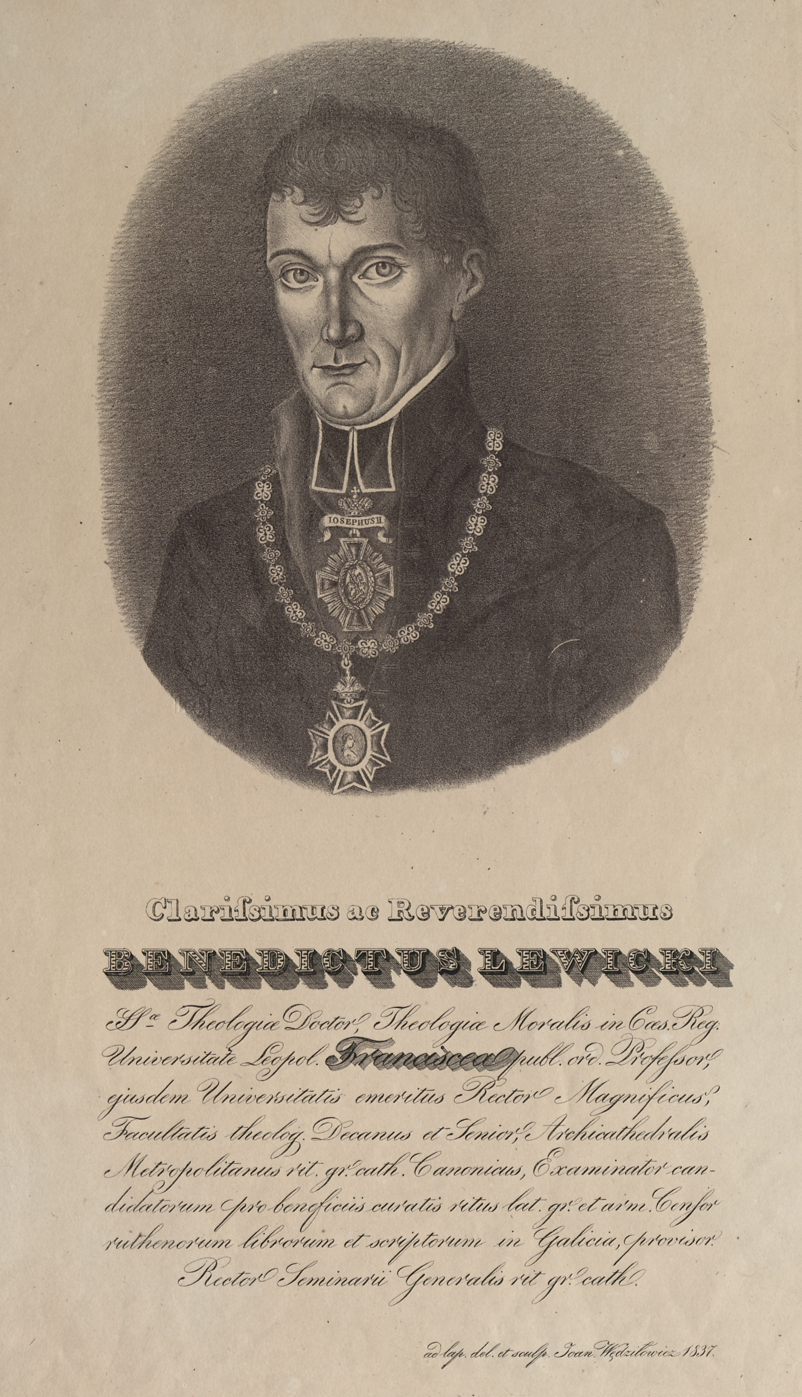 Wenedykt Łewyćkyj / Benedykt Lewicki